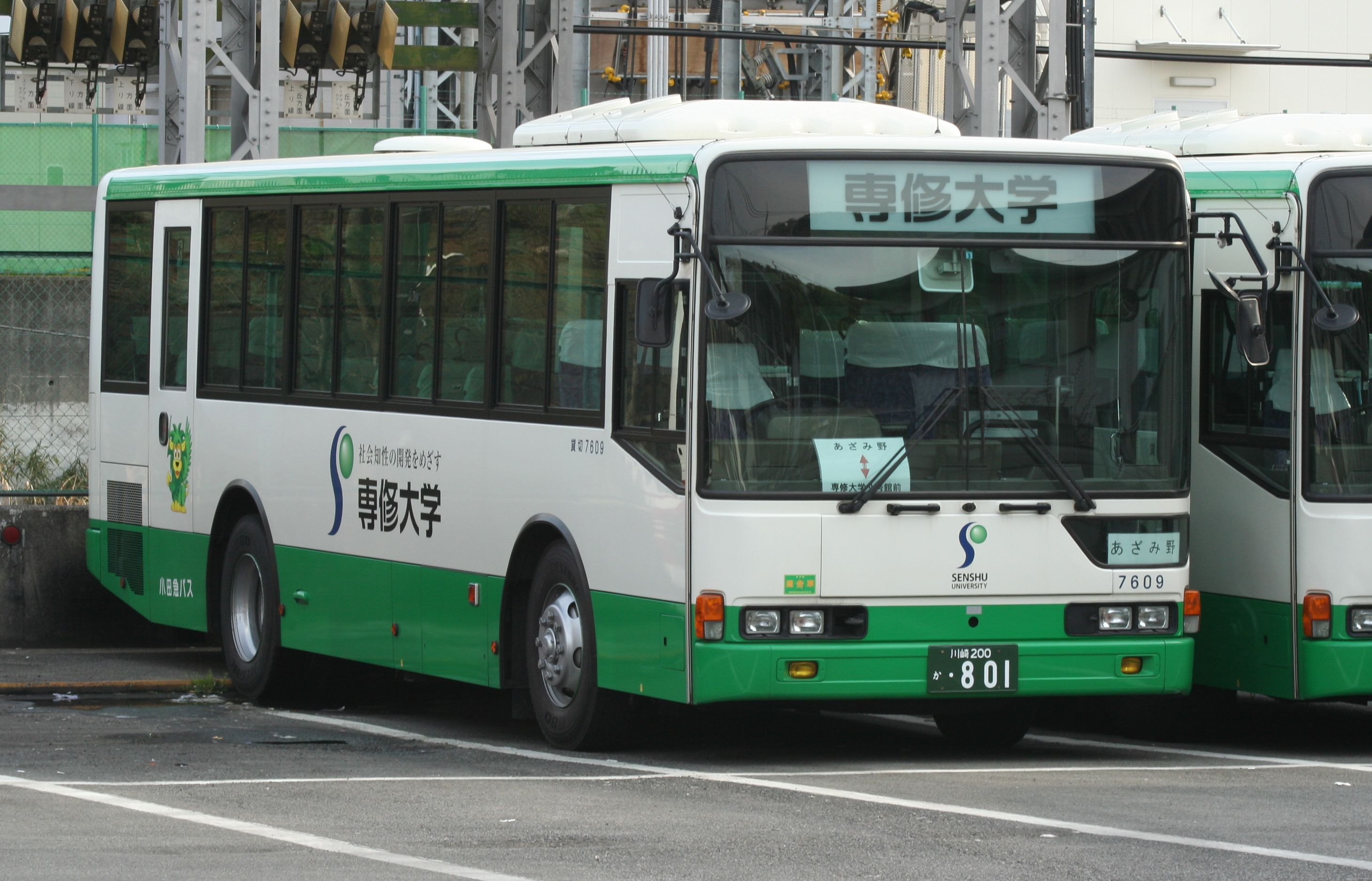 小田急バス生田営業所 専修大学スクールバス